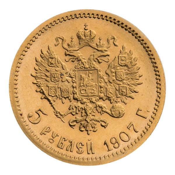 Пять рублей 1907 г. (реверс). Биткин 33 (R3). Двуглавый орёл с распростёртыми крыльями под тремя коронами; из верхней короны спускается развевающаяся Андреевская лента; на груди орла щит с гербом Москвы, окружённый цепью ордена св. Андрея Первозванного. На крыльях орла щиты с гербами Царства Казанского, Царства Польского, Царства Херсонеса Таврического, соединённый герб Великих княжеств Киевского, Владимирского и Новгородского, Царства Астраханского, Царства Сибирского, Царства Грузинского и Княжества Финляндского. Круговая надпись: 5 РУБЛЕЙ 1907 Г. Зубчатый ободок по краю.